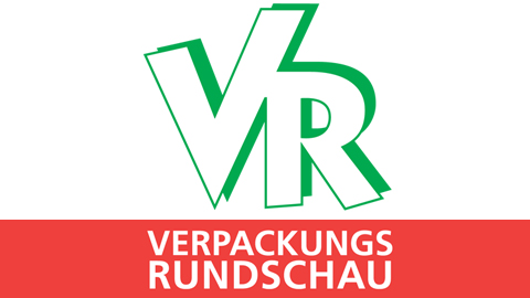 VR - Verpackungs-Rundschau